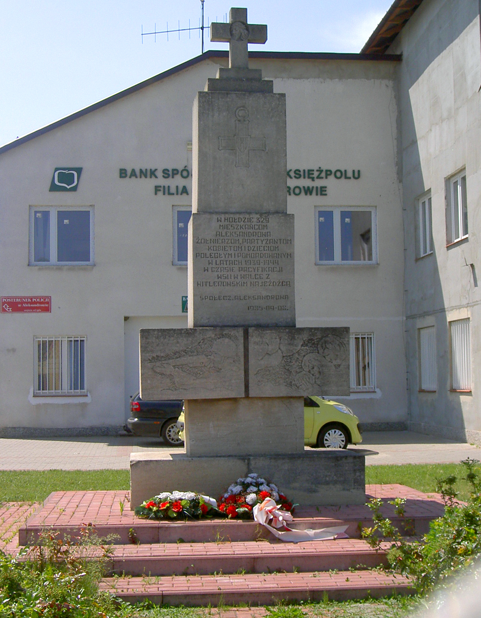 Aleksandrów (powiat biłgorajski), Poland • Pomnik / Monument